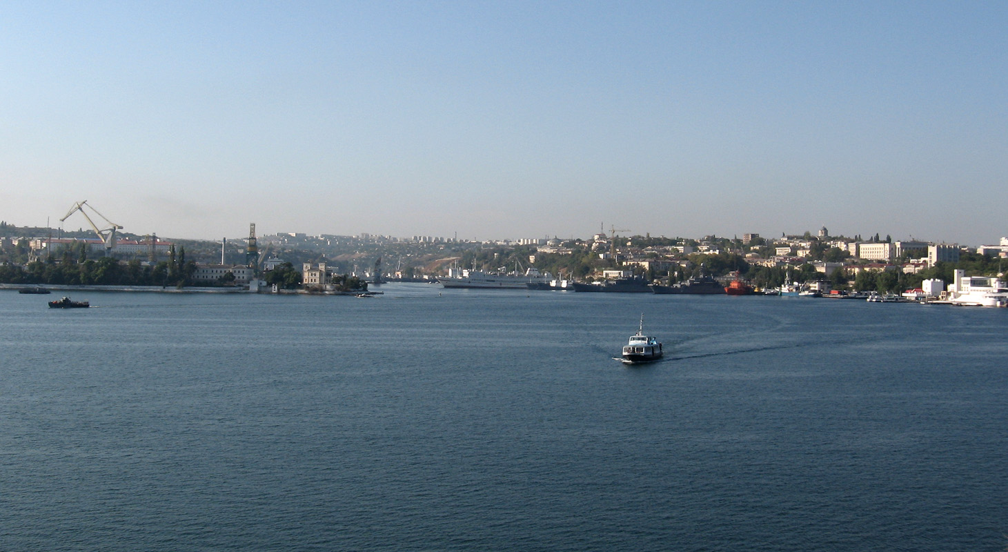 Южная сторона в Севастополе, вход в Южную бухту